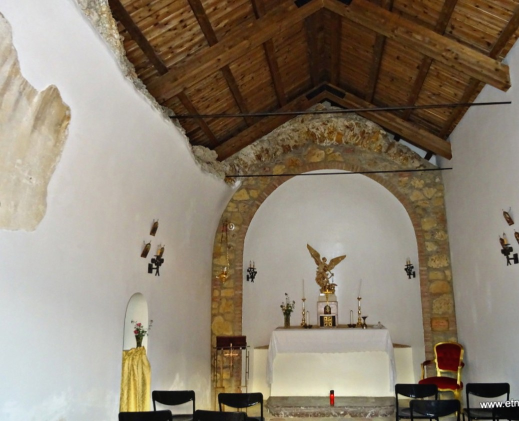 Foto di San Michele, chiesa di Allume